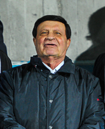 Oreste Bamonte (presidente AS Giana Erminio) in tribuna allo Stadio comunale Città di Gorgonzola durante la partita di calcio Giana Erminio-Unione Venezia, valida per il campionato di Lega Pro 2014-2015